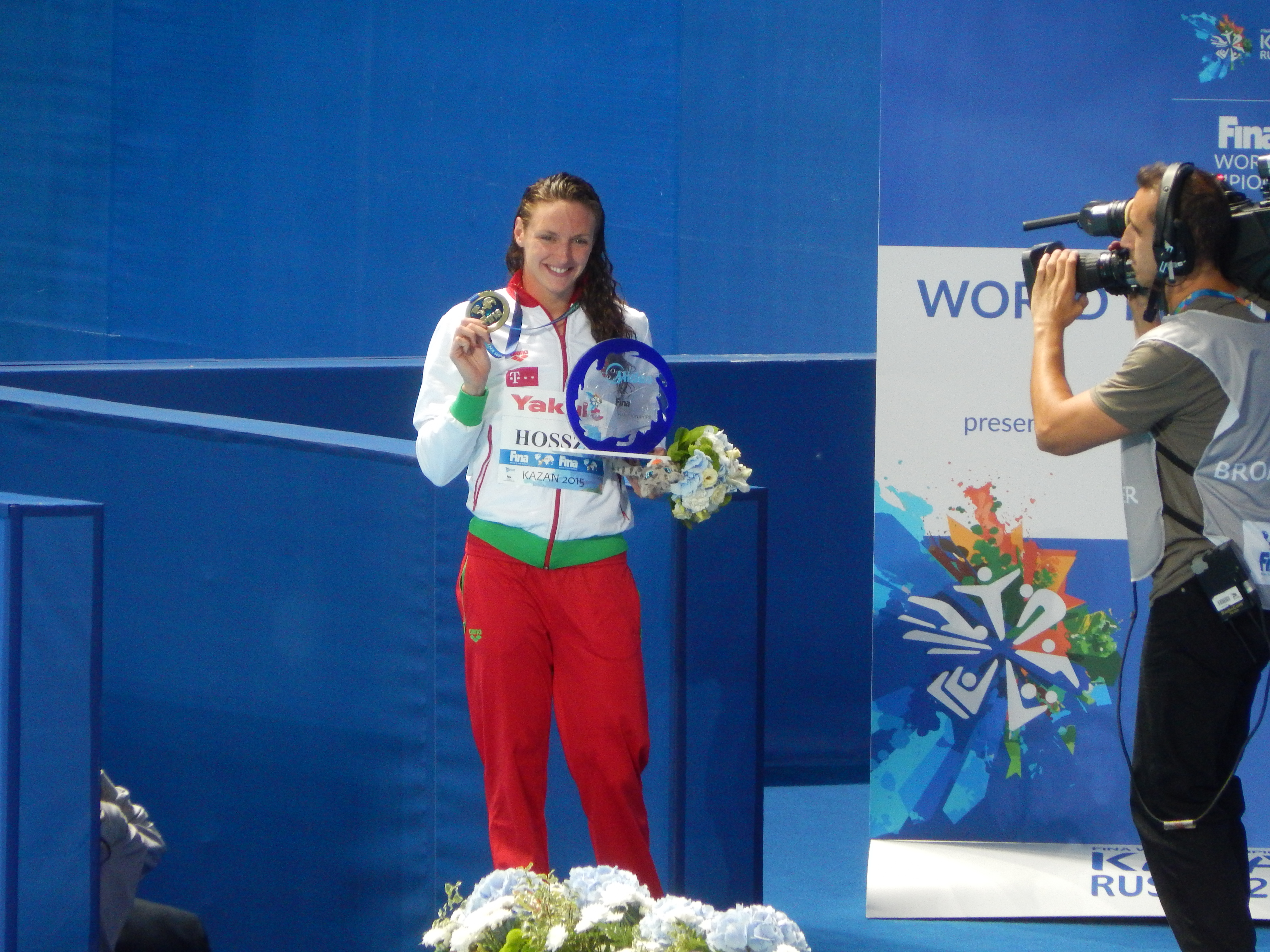 Награждение обладательницы мирового рекорда Катинки Хоссу в Казани